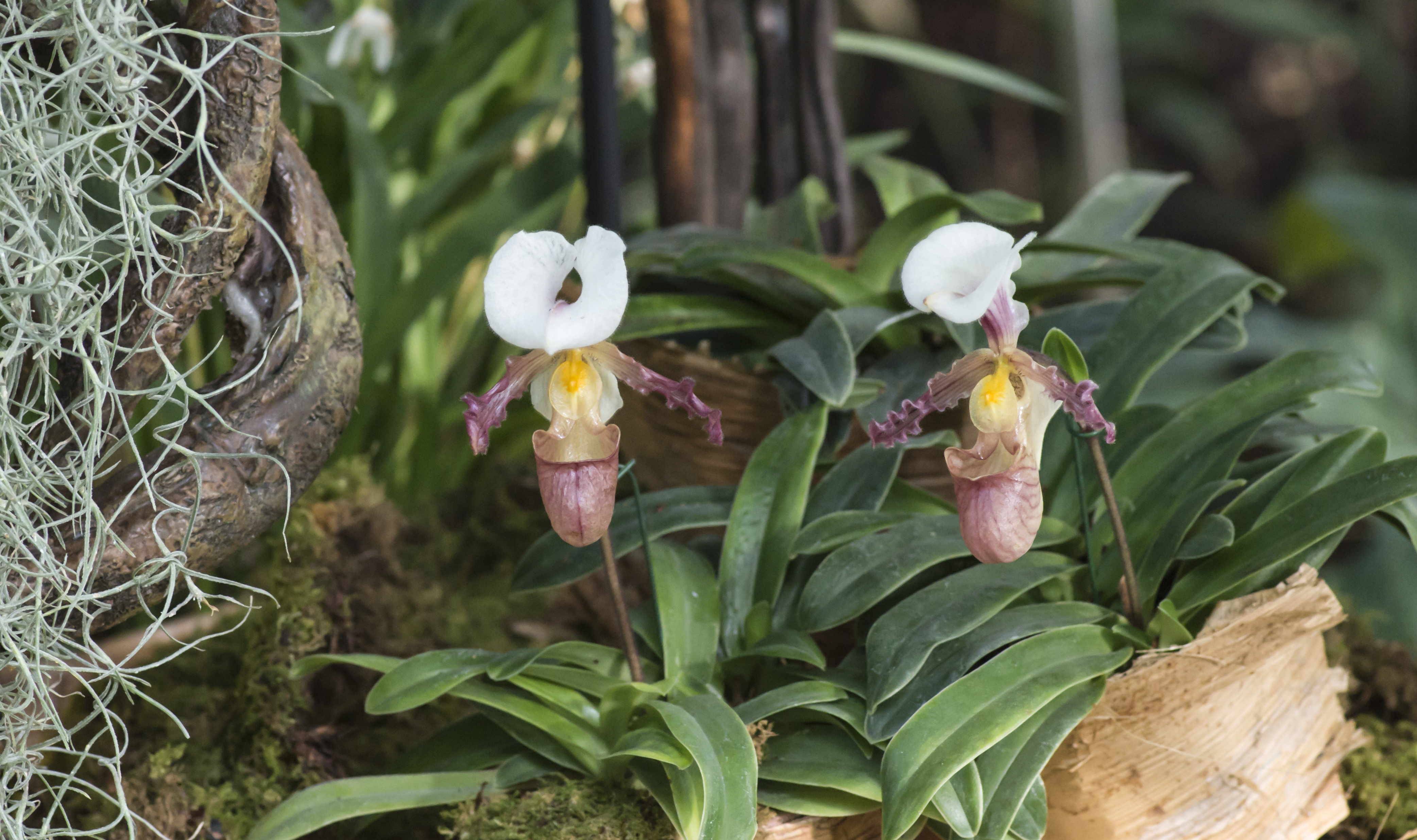 Paphiopedilum tranlienianum - serres du Jardin des Plantes